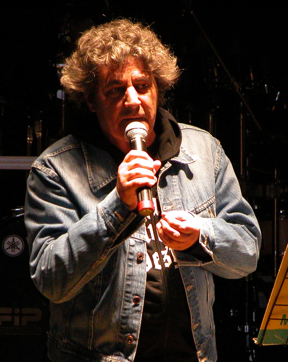 Fausto Leali in concerto per la Festa di S.Antonio da Padova